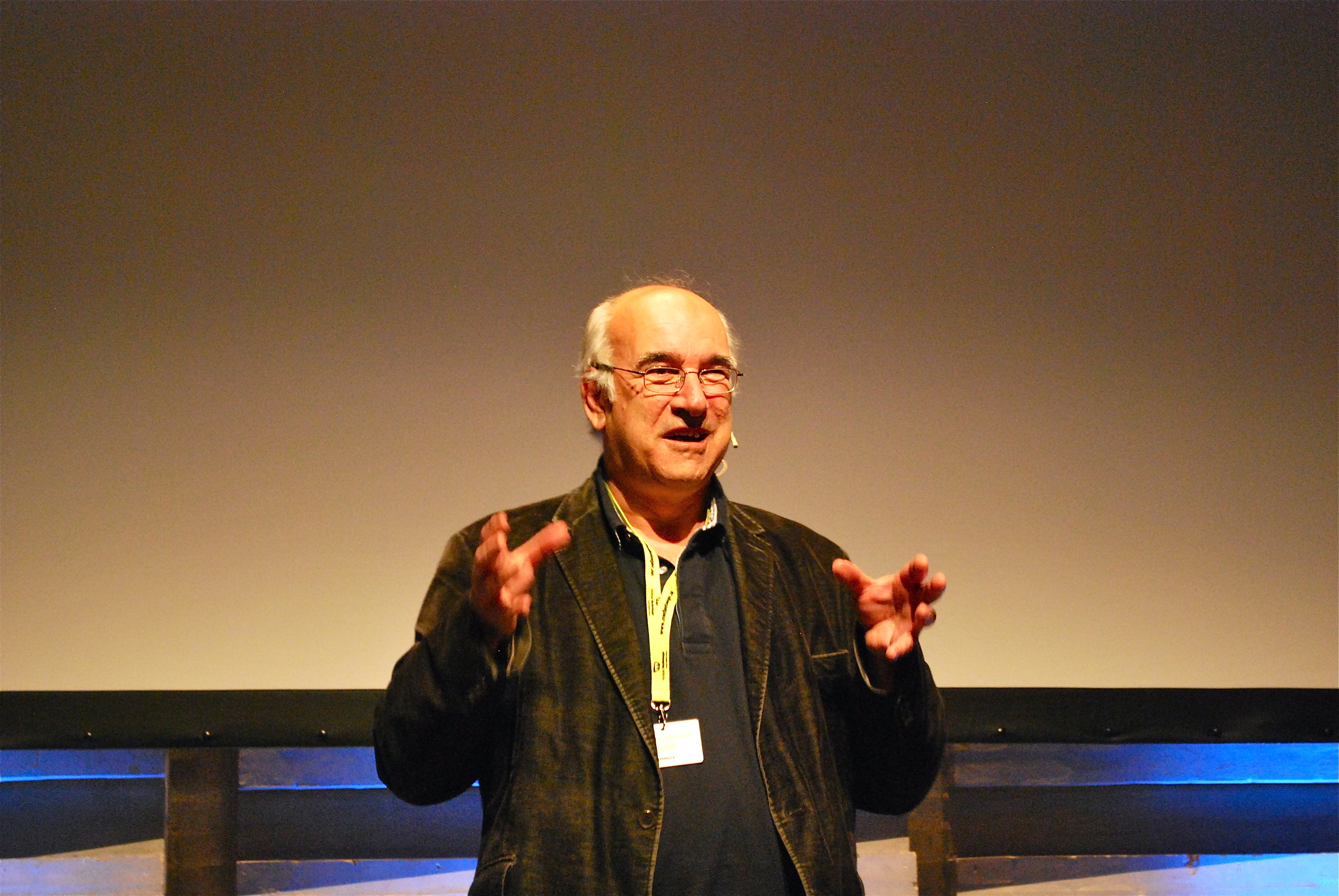 Foto: Renate Sæle